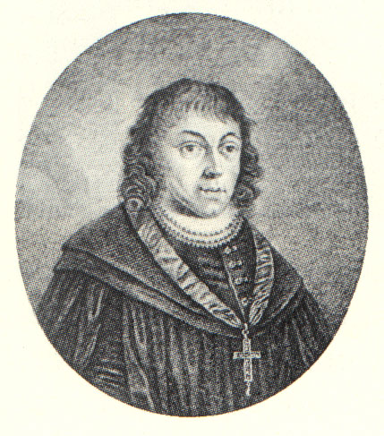 Johann von Dalberg, Bischof von Worms